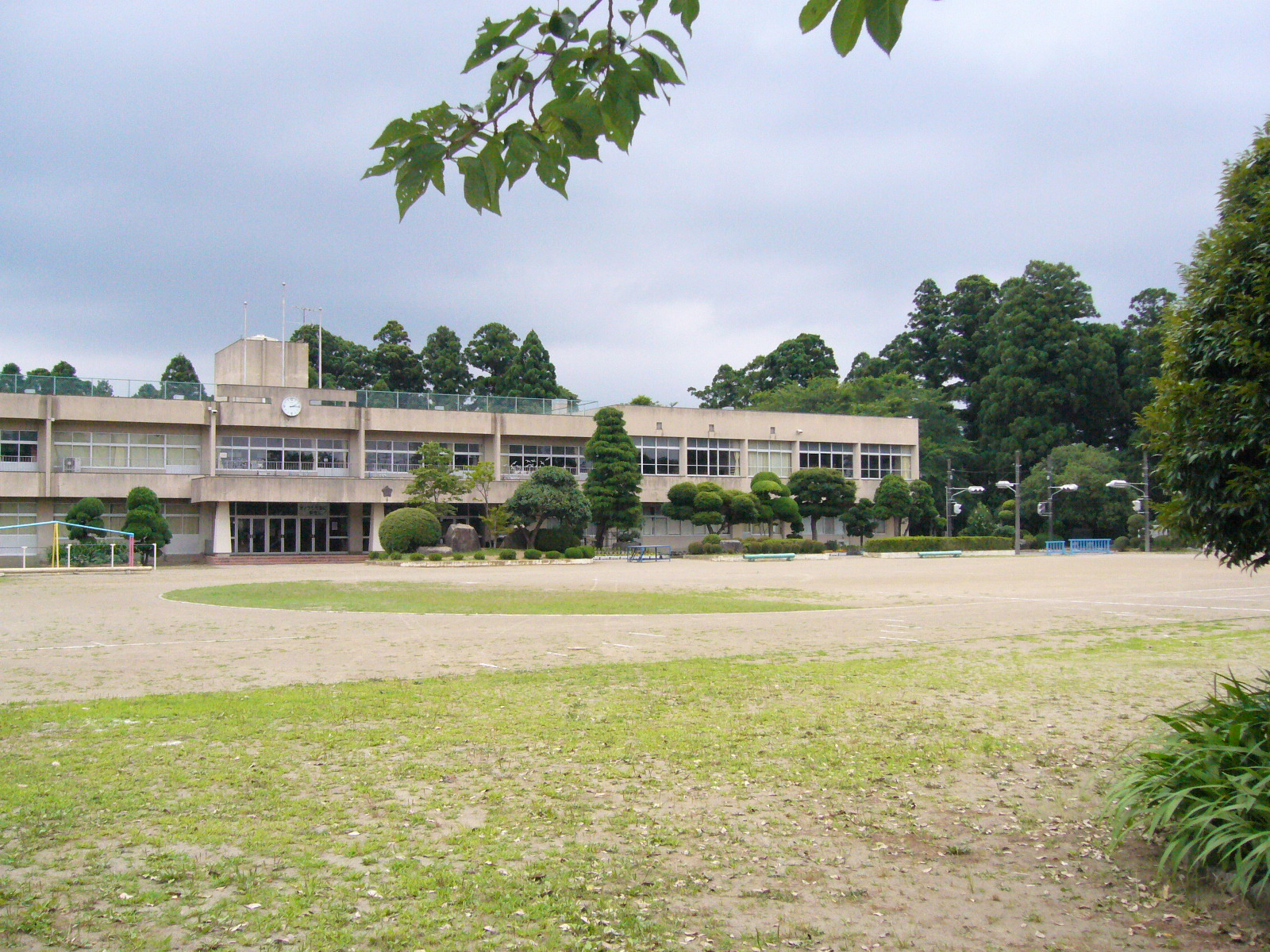 katori-elementary-school2,katori-city,japan